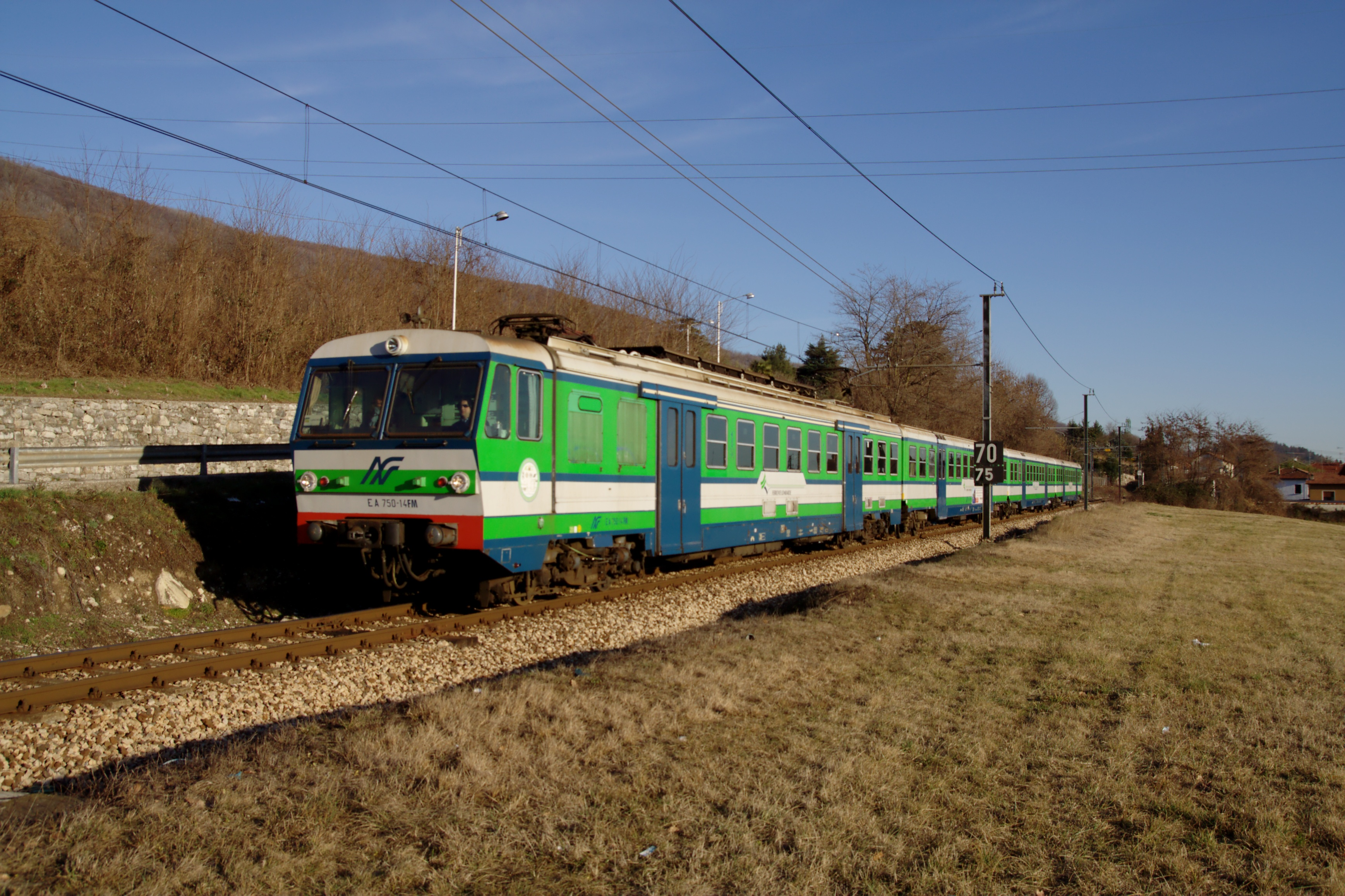 Elettromotrice EA.750 delle Ferrovie Nord Milano, in corsa fra Cocquio e Gavirate